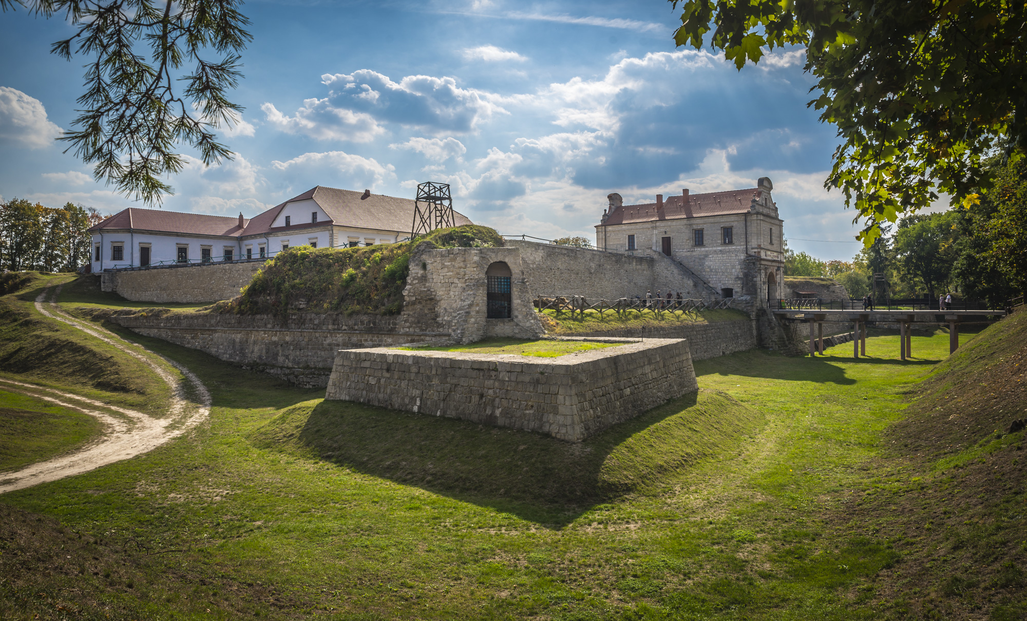 Замок, Збараж, вул. Морозенка, 38